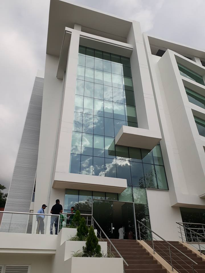 Edificio denominado la "casa blanca", en el cual funciona la Rectoría de la Universidad de Sucre